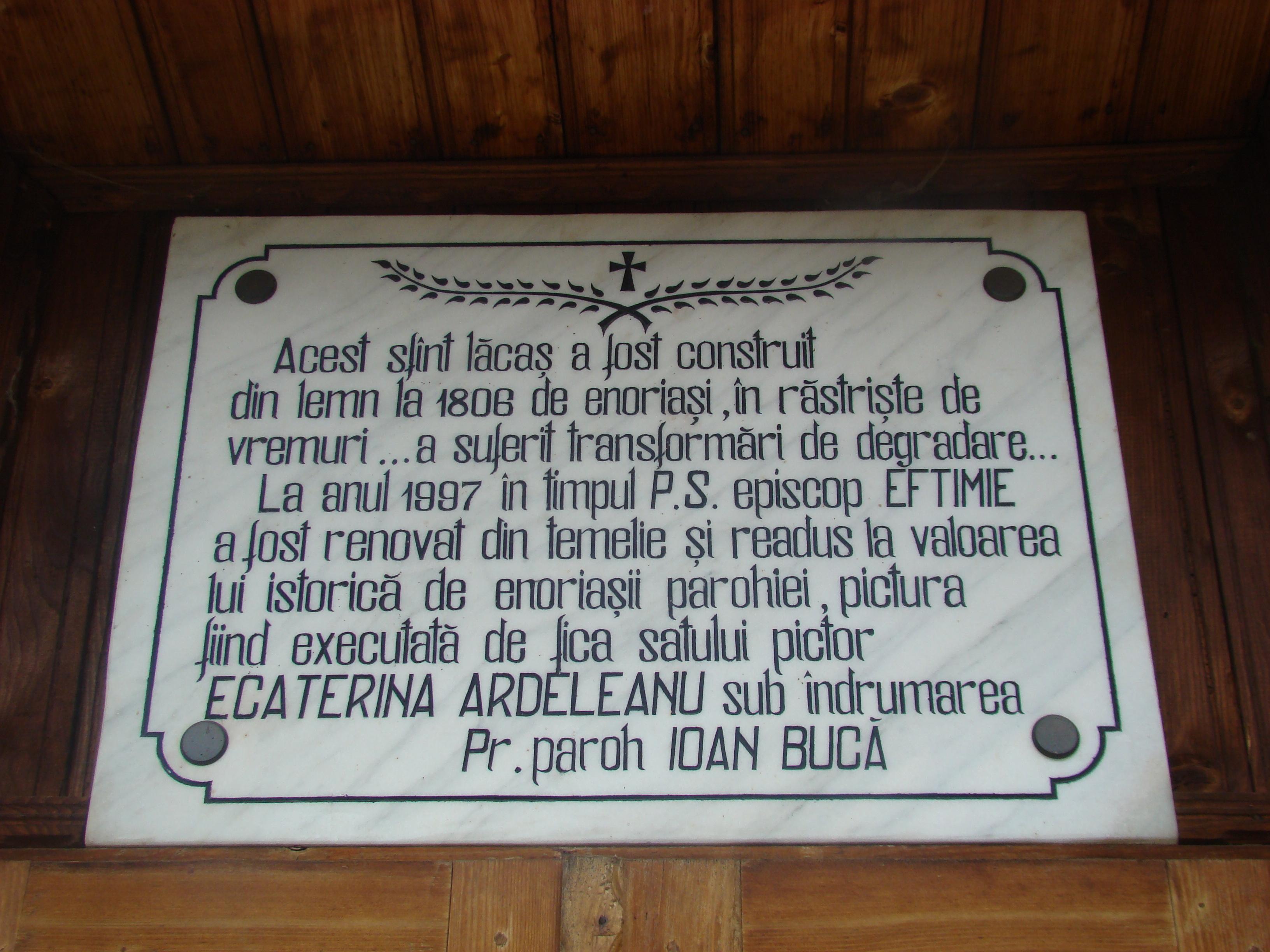 Negoiești, Bacău